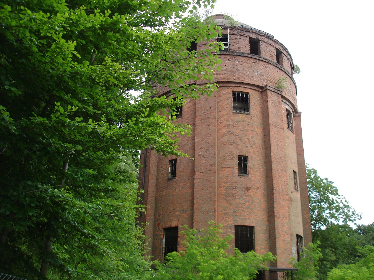 Wasserturm der ehemaligen Dynamitfabrik Krümmel, Vorderansicht